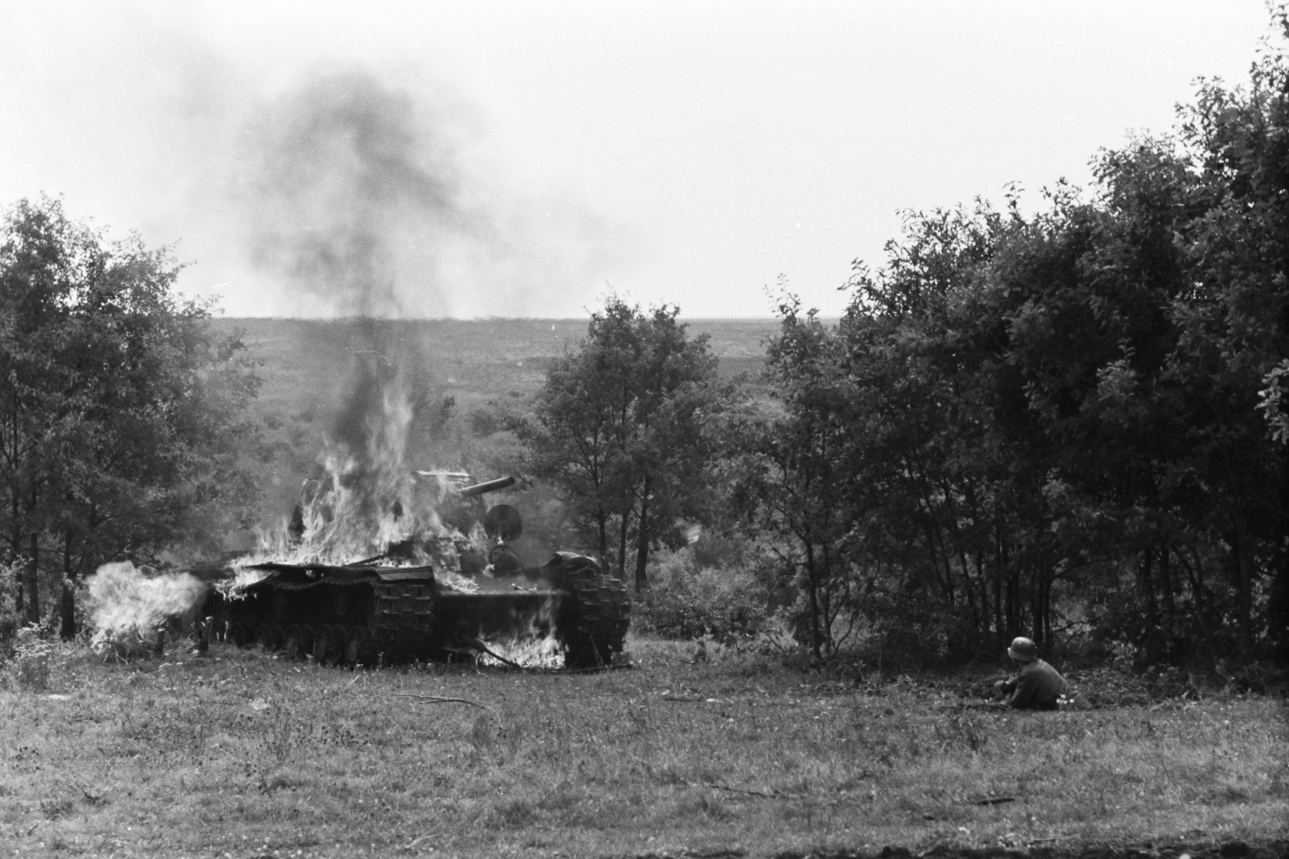 A szovjet hadsereg KV-1 típusú nehéz harckocsija.Russia Tags: wreck, tank, Soviet brand, fire, second World War Title: A szovjet hadsereg KV-1 típusú nehéz harckocsija.